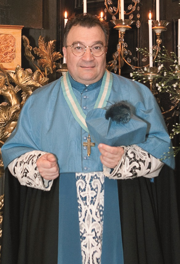 Mgr Wach devant saint François de Sales